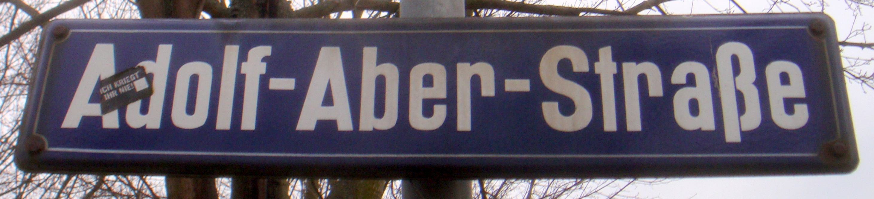 Straßenschild Adolf-Aber-Straße in Apolda